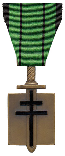 Croix de la libération